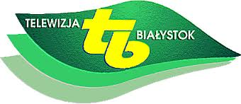 Pierwsze logo TVP Białystok z 1993 roku.